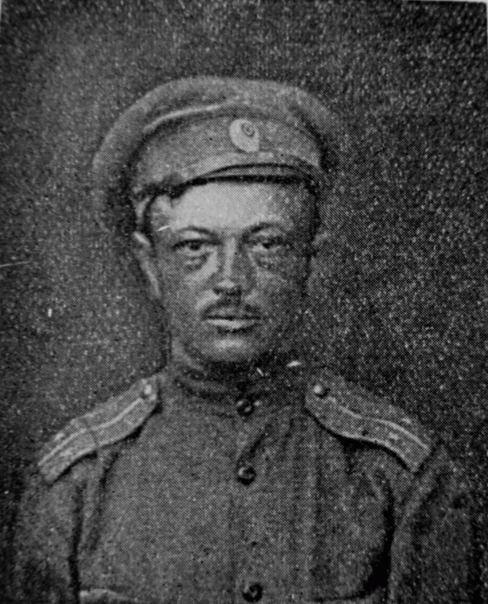 Josef Jiří Švec (* 19. července 1883, Čenkov – 25. října 1918 Aksakovo) byl učitel tělocviku, sokolský pracovník, legionář a plukovník legií v Rusku. Na fotografii jako první český dobrovolník - důstojník československých legií.